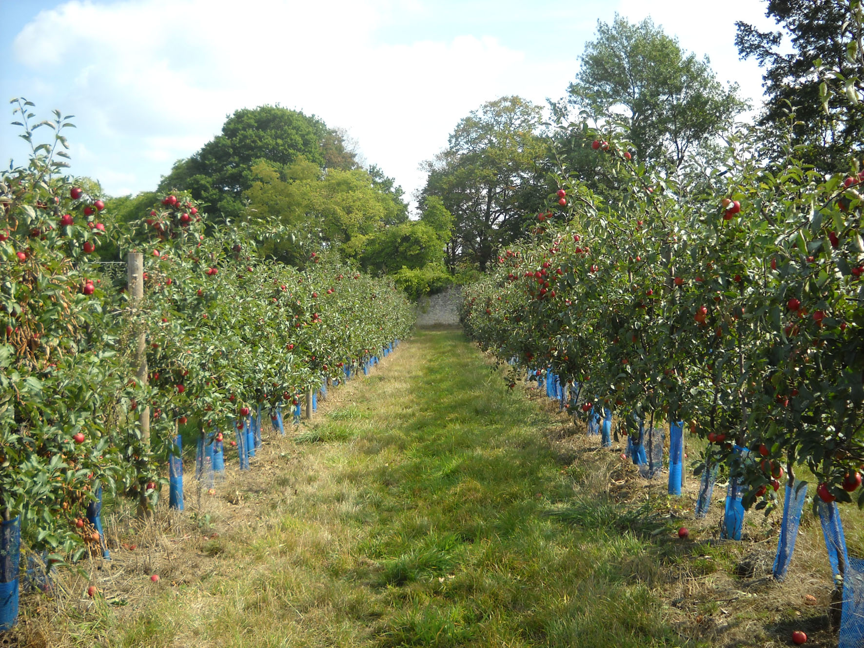 Photo représentant le verger de pommes de la Cueillette de Gally